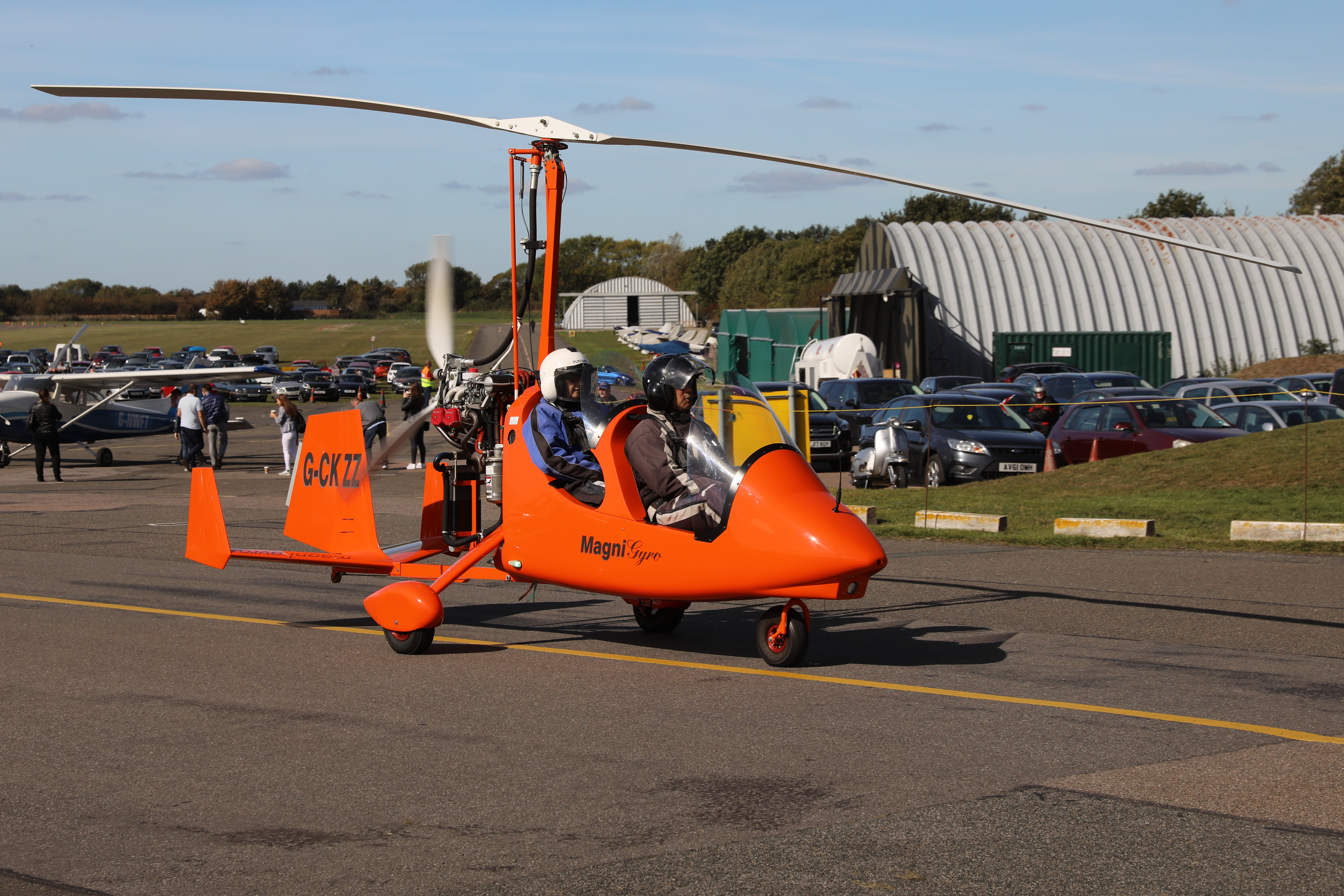 Magni M16C Tandem Trainer G-CKZZ 5D4_2146